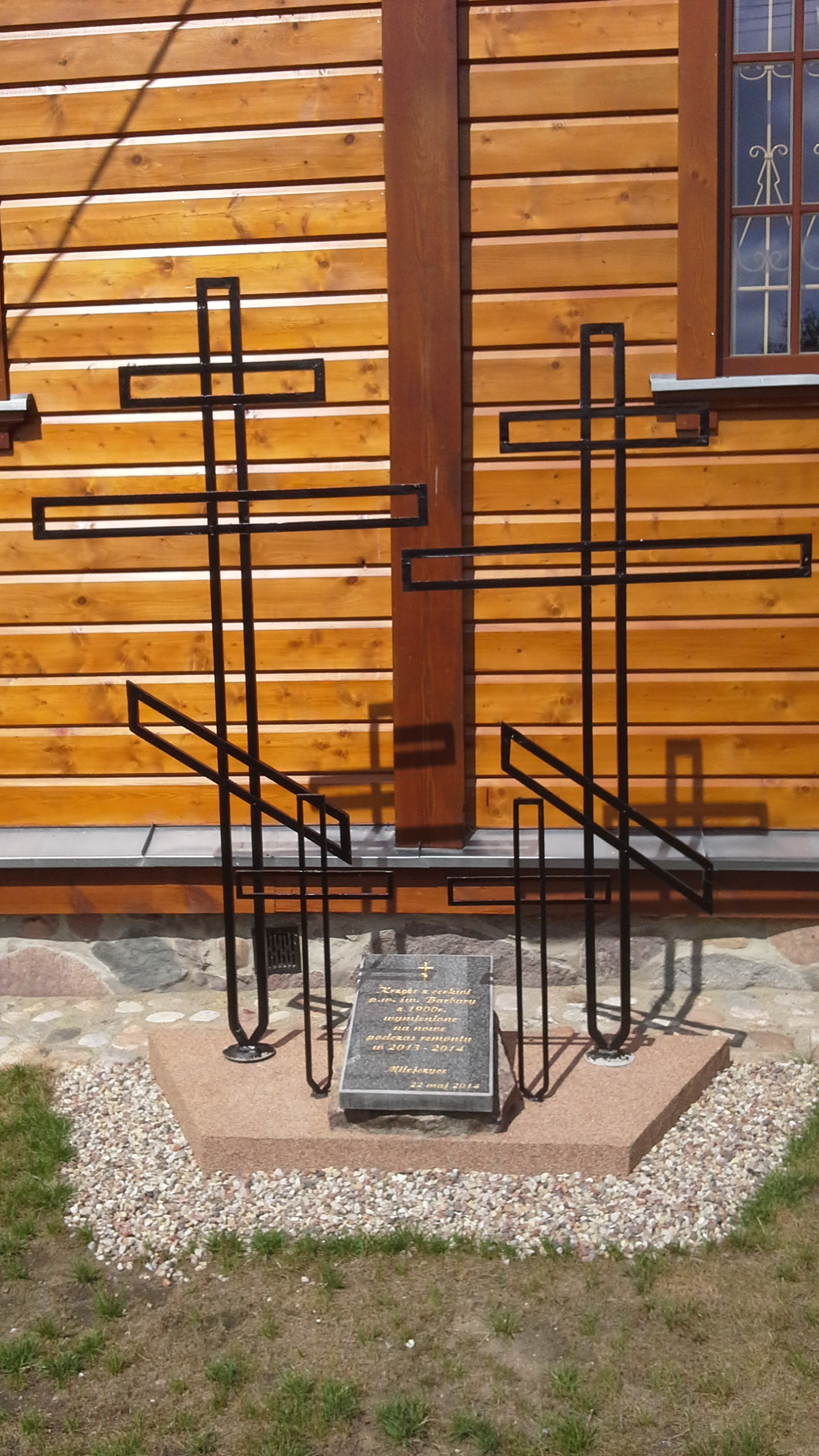 Krzyże znajdujące się pierwotnie na kopułach cerkwi w Milejczycach, po remoncie w 2014 r. ustawione obok budynku